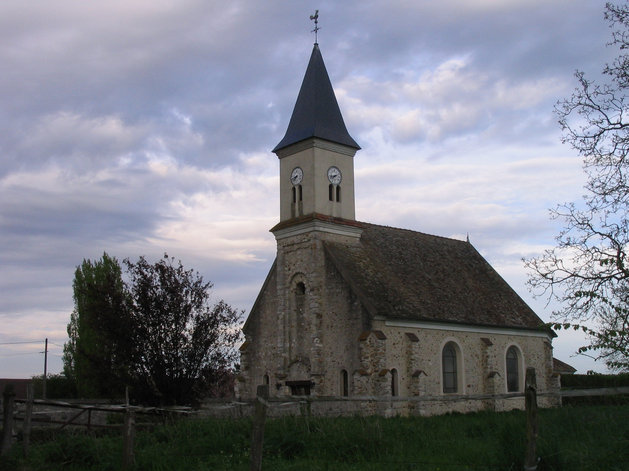 Eglise de Flacourt